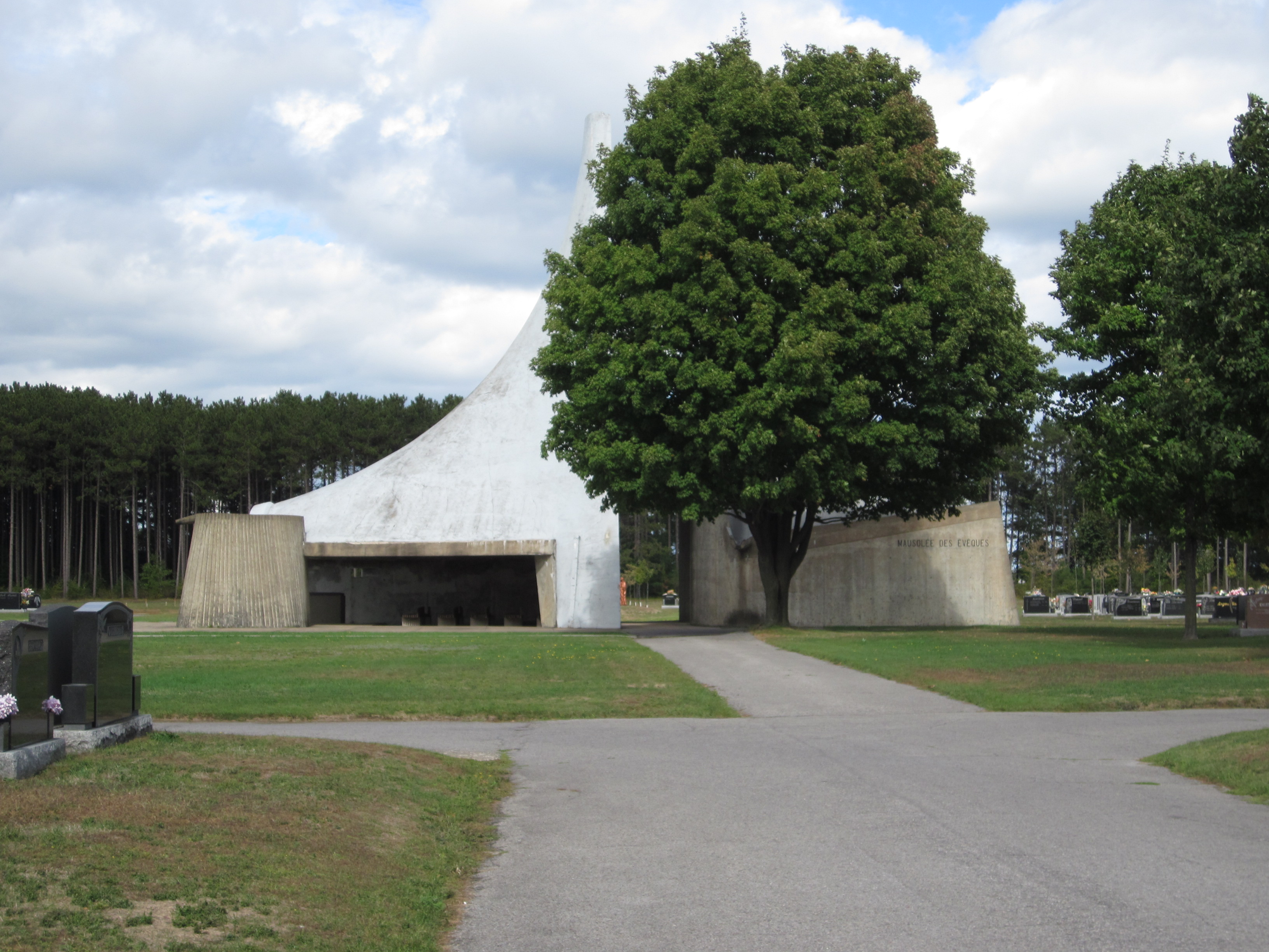 Mausolée des Évêques-de-Trois-Rivières, 3400, boulevard des Forges, Trois-Rivières (Canada). (Protection MH classé. Voir la liste des lieux patrimoniaux de la Mauricie pour plus de détails).